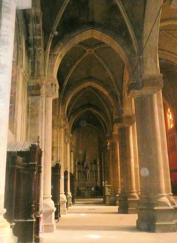 Saint-Chamond (Loire), collatéral nord de l'église Notre-Dame.